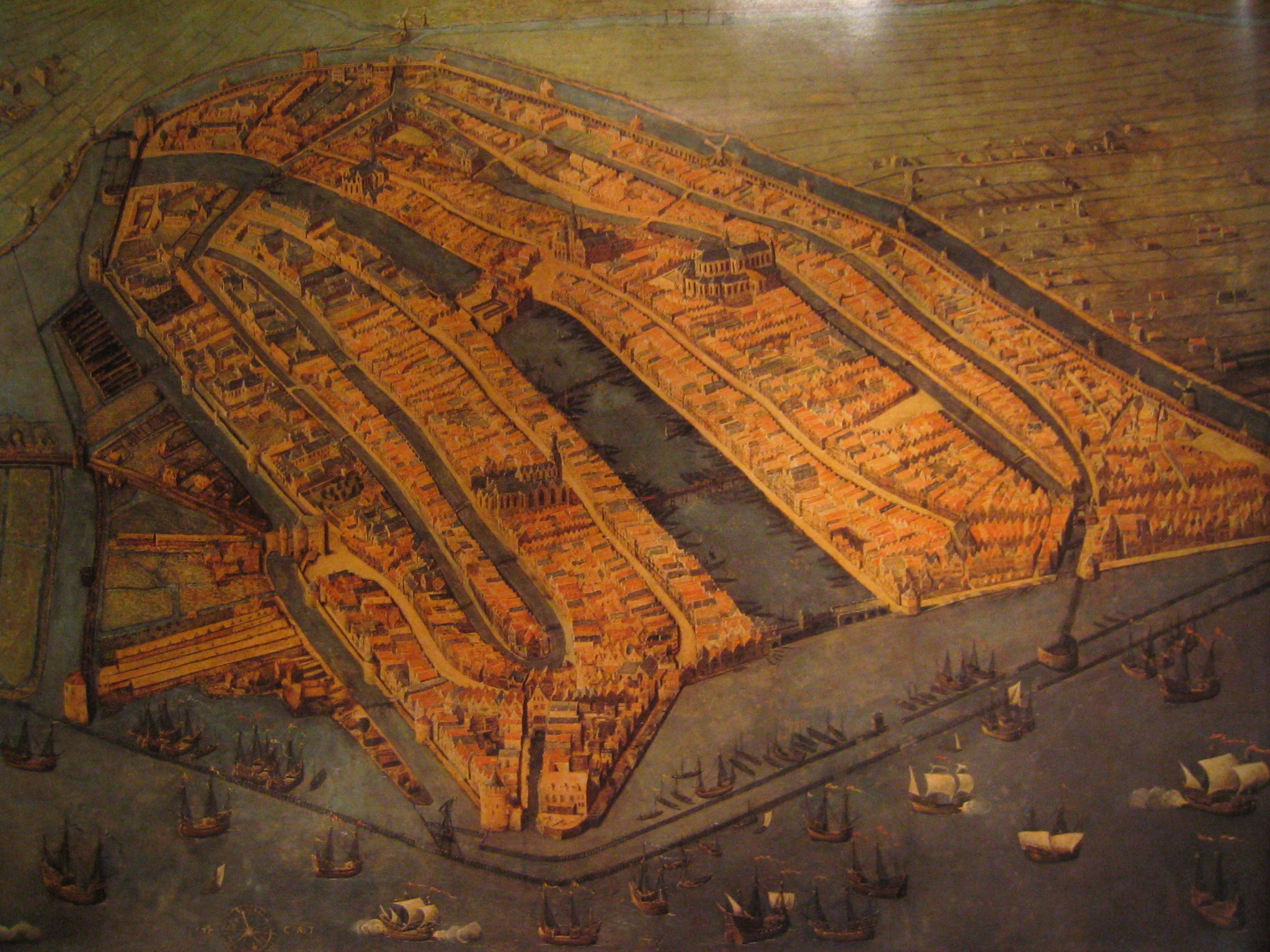 Gezicht op Amsterdam in vogelvlucht, cropped.